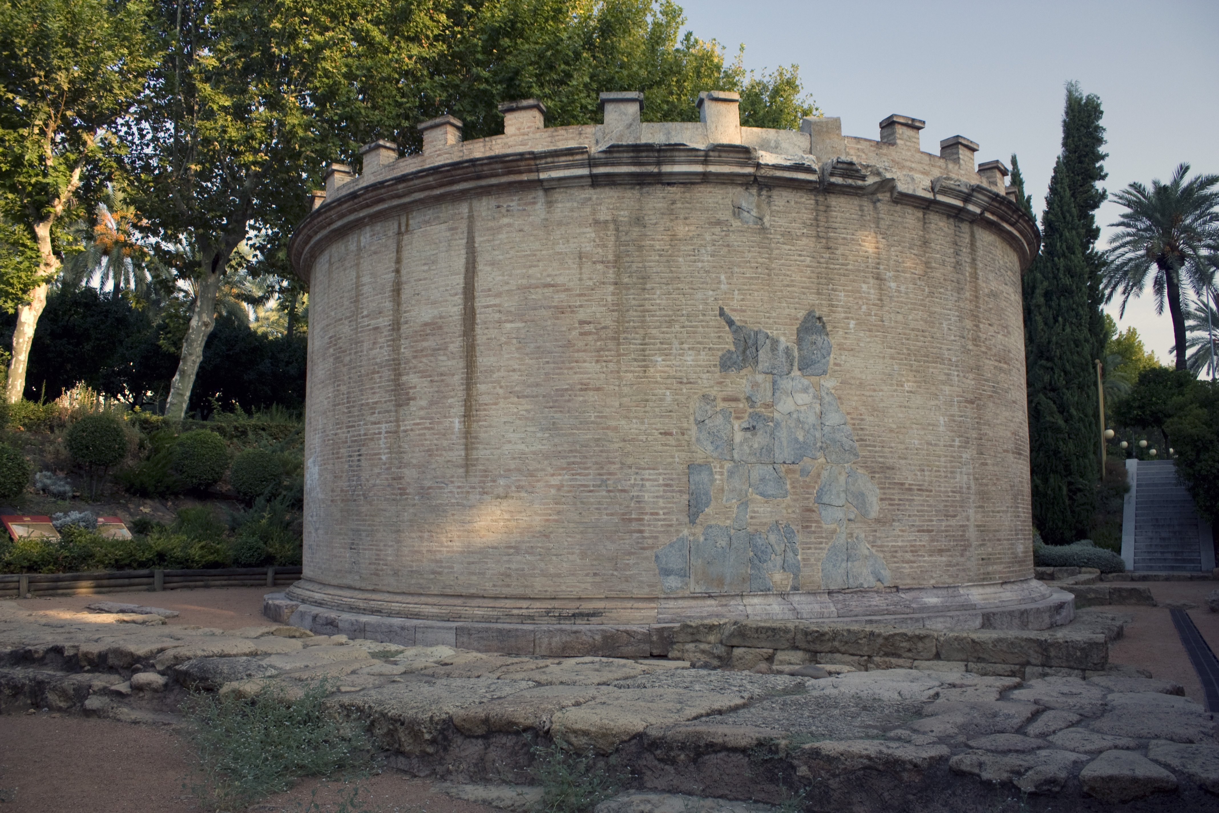 Mausolées encadrant la voie romaine Curduba-Hispalis